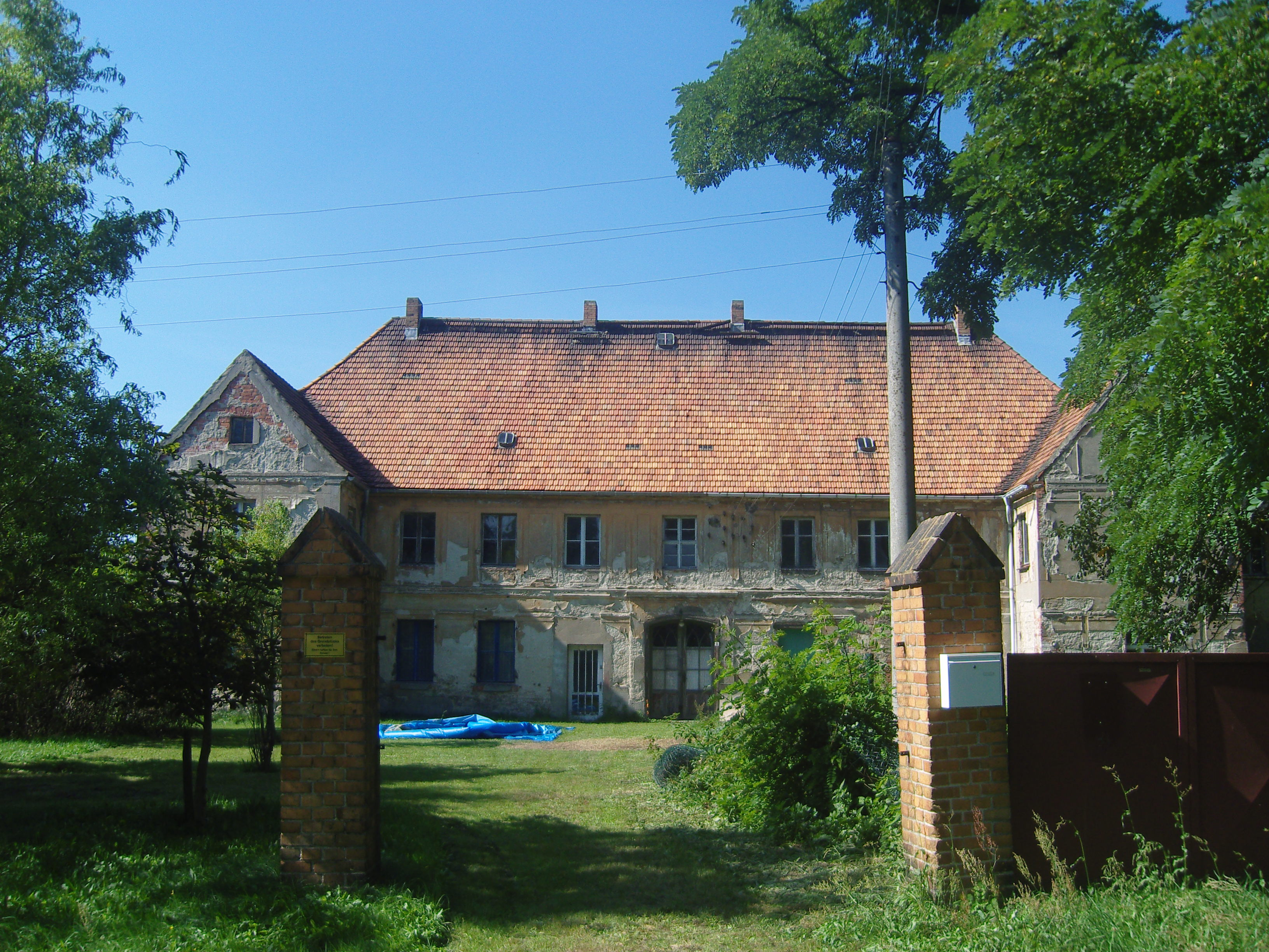 denkmalgeschütztes Gutshaus in Lug